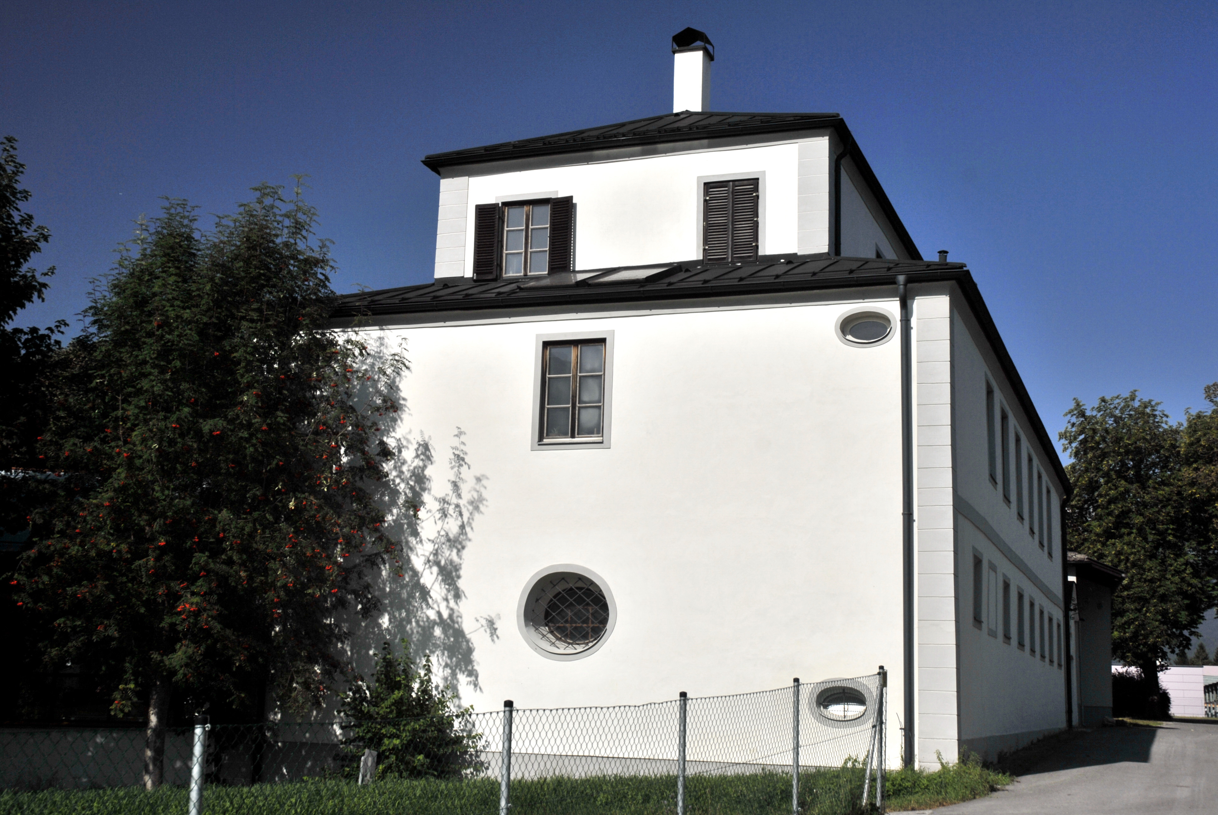 Thömlschlössl in Hall in Tirol, von Osten